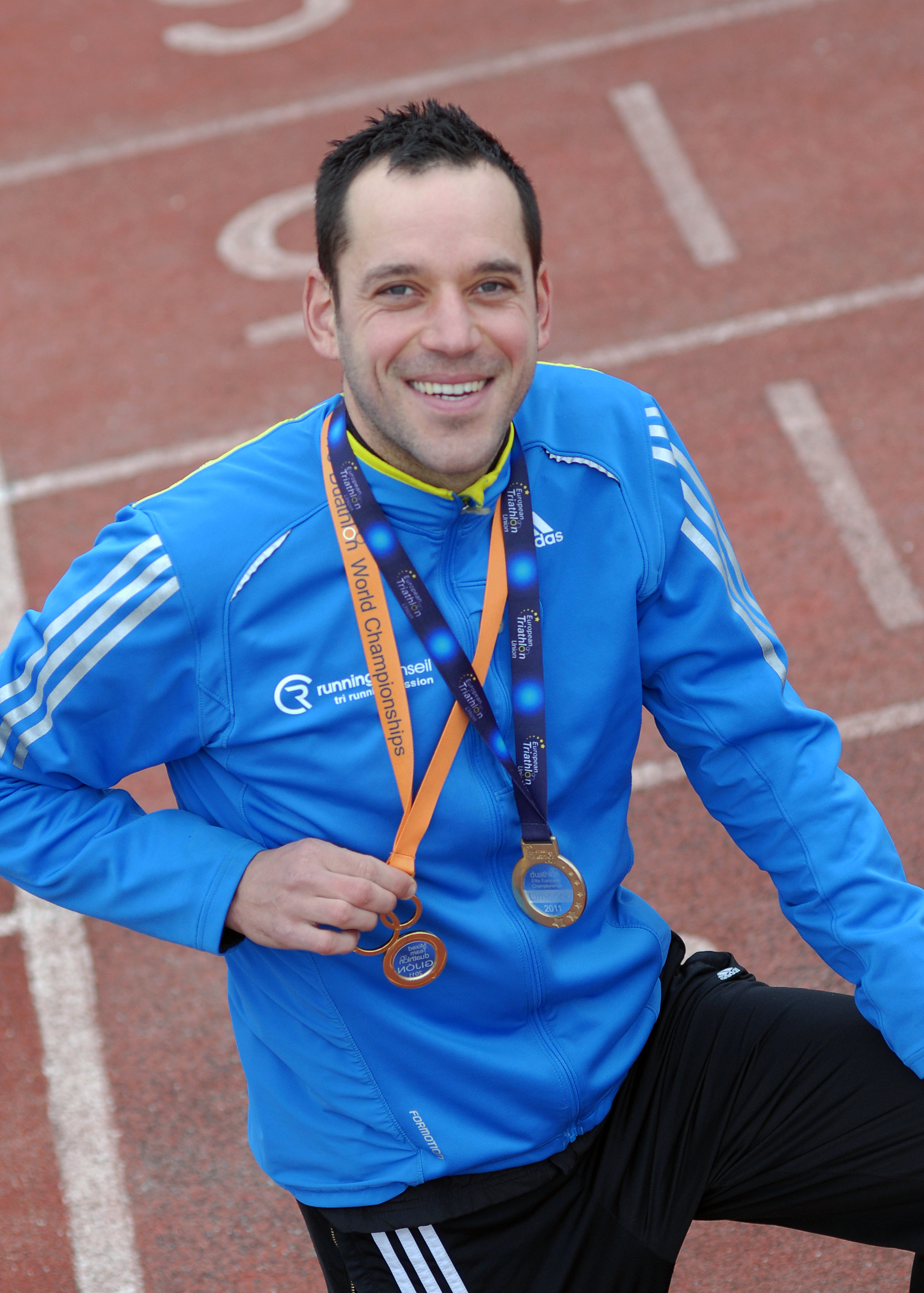 Portrait de Benoît Nicolas, duathlète français